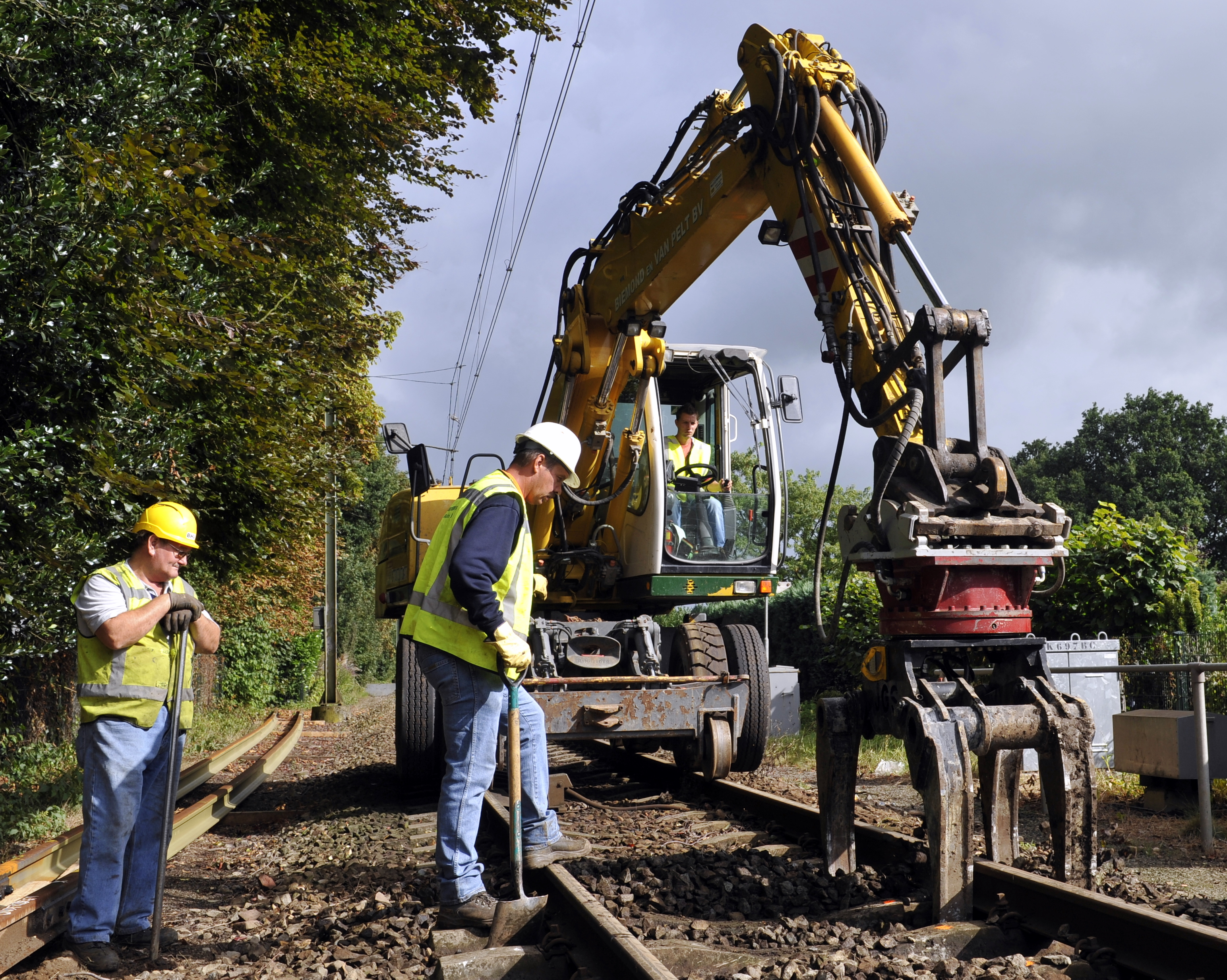 Dit weekend was het treinverkeer tussen Baarn en Den Dolder gestremd. Het spoor van station Soest en Soestdijk werd door ProRail vernieuwd. NS zette bussen in om reizigers te vervoeren.